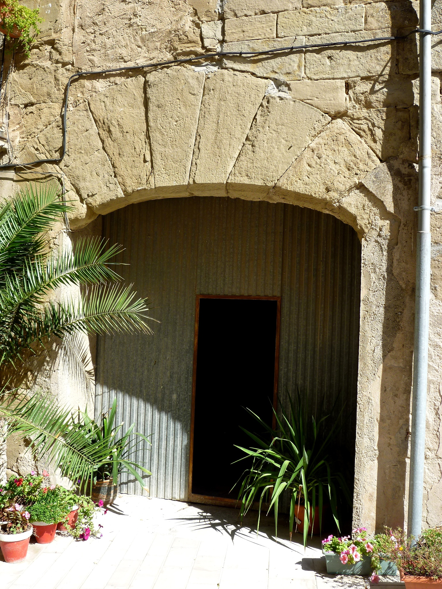 Cal Nuix (Ivorra): Portal